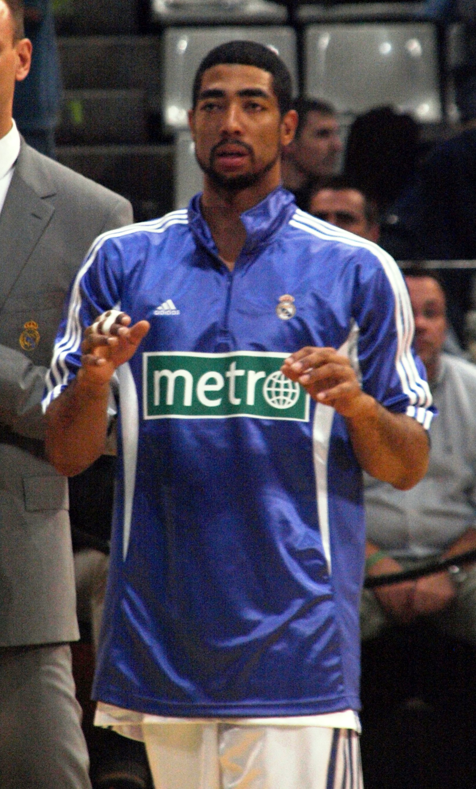 Jeremiah Massey en el Olímpico de Badalona en noviembre de 2008